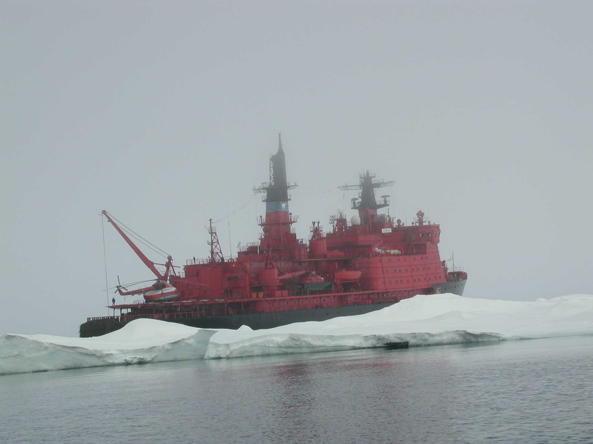 Атомный ледокол "Ямал".(Russian Nuclear-powered ships "Yamal"(Icebreakers))